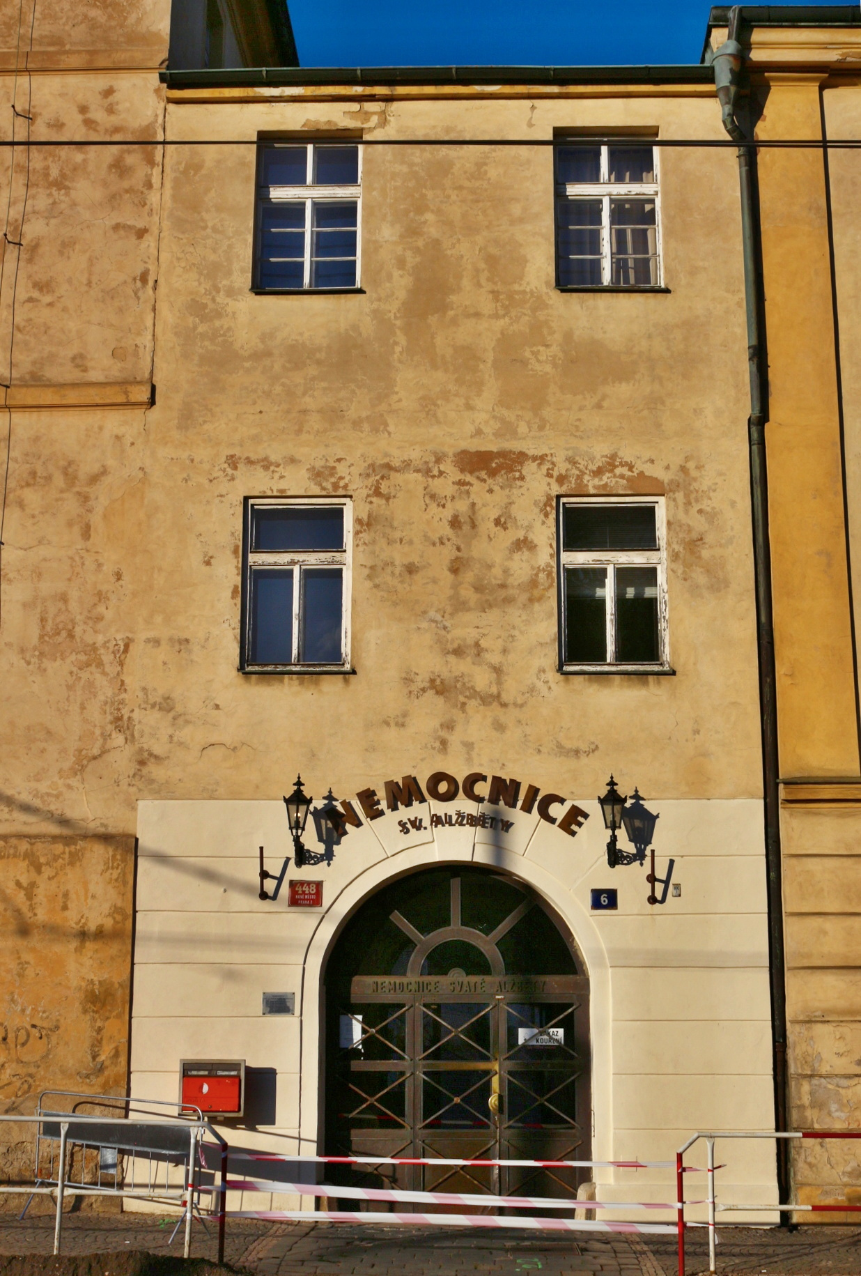 Praha, klášter a nemocnice u sv. Alžběty